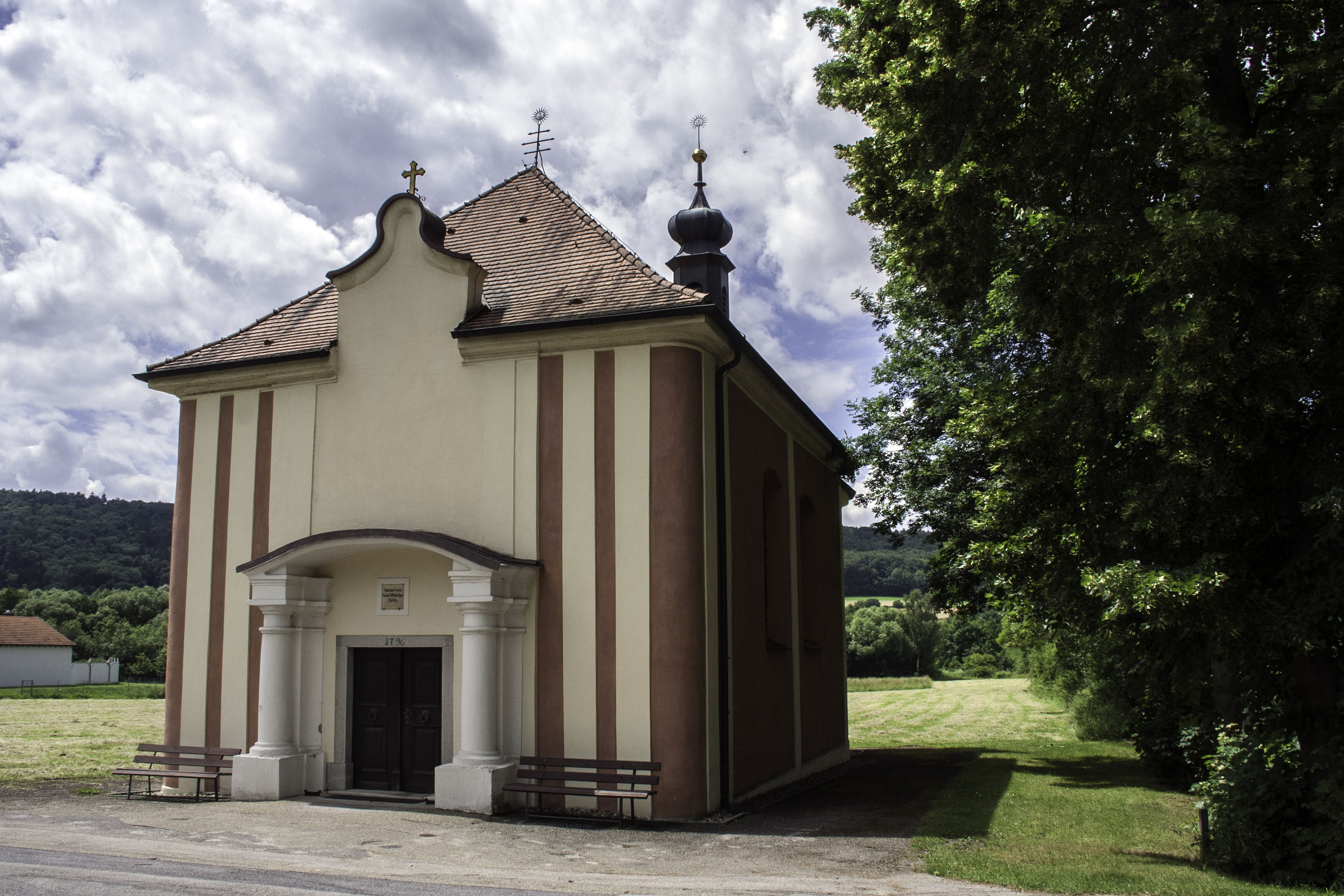 Katholische Wallfahrtskirche Mariahilf, bez. 1796; mit Ausstattung.